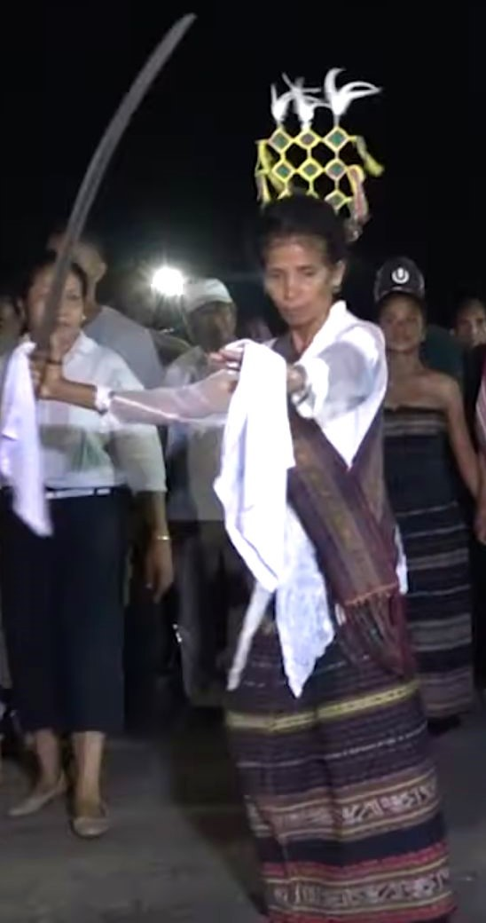 Traditionelle Tänzerin in Mehara, Osttimor